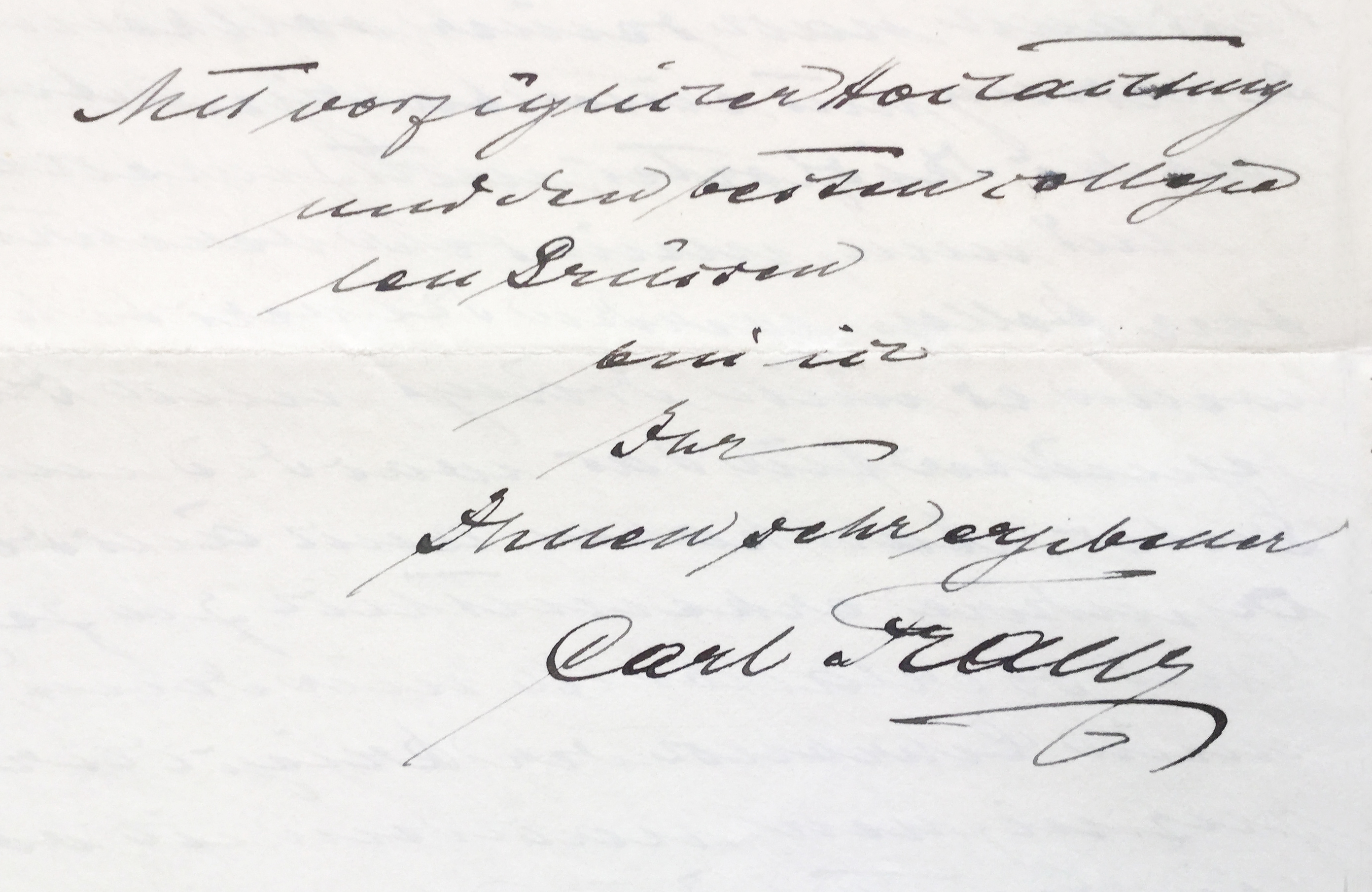 Unterschrift von Generaloberstabsarzt Carl Franz. Ausschnitt aus einem handgeschriebenen Brief. Abfotografiert vom Original